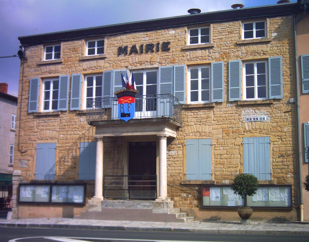 La mairie de Chasselay (Rhône), construite en "pierres dorées".